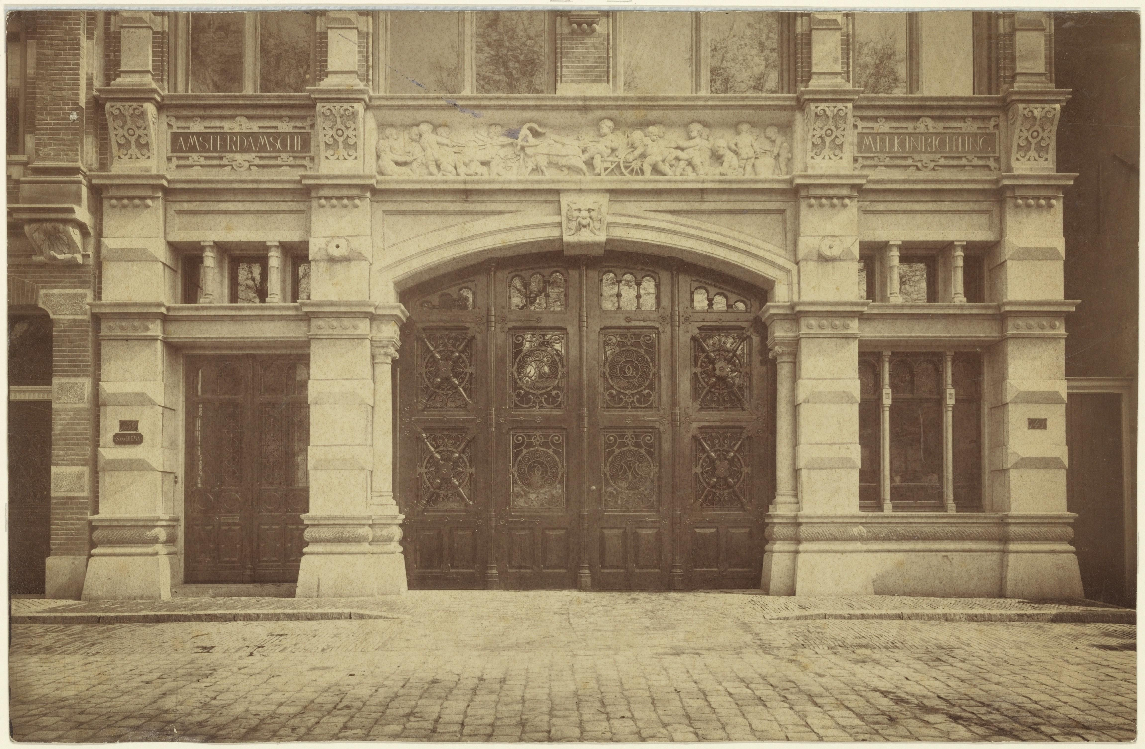 Beschrijving De ingang van het gebouw van de Amsterdamsche Melkinrichting, Prinsengracht 739-741, gebouwd naar ontwerp van architect Ed. Cuypers Boven de poort een fries van beeldhouwer P.E. van den Bossche. Documenttype foto Vervaardiger Onbekend Anoniem Collectie Collectie Stadsarchief Amsterdam: foto-afdrukken Datering 1900 Geografische naam Prinsengracht Inventarissen Afbeeldingsbestand ANWQ00302000001